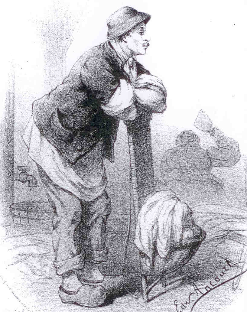 Garçon de lavoir (au fond à droite on distingue une blanchisseuse le battoir en main.